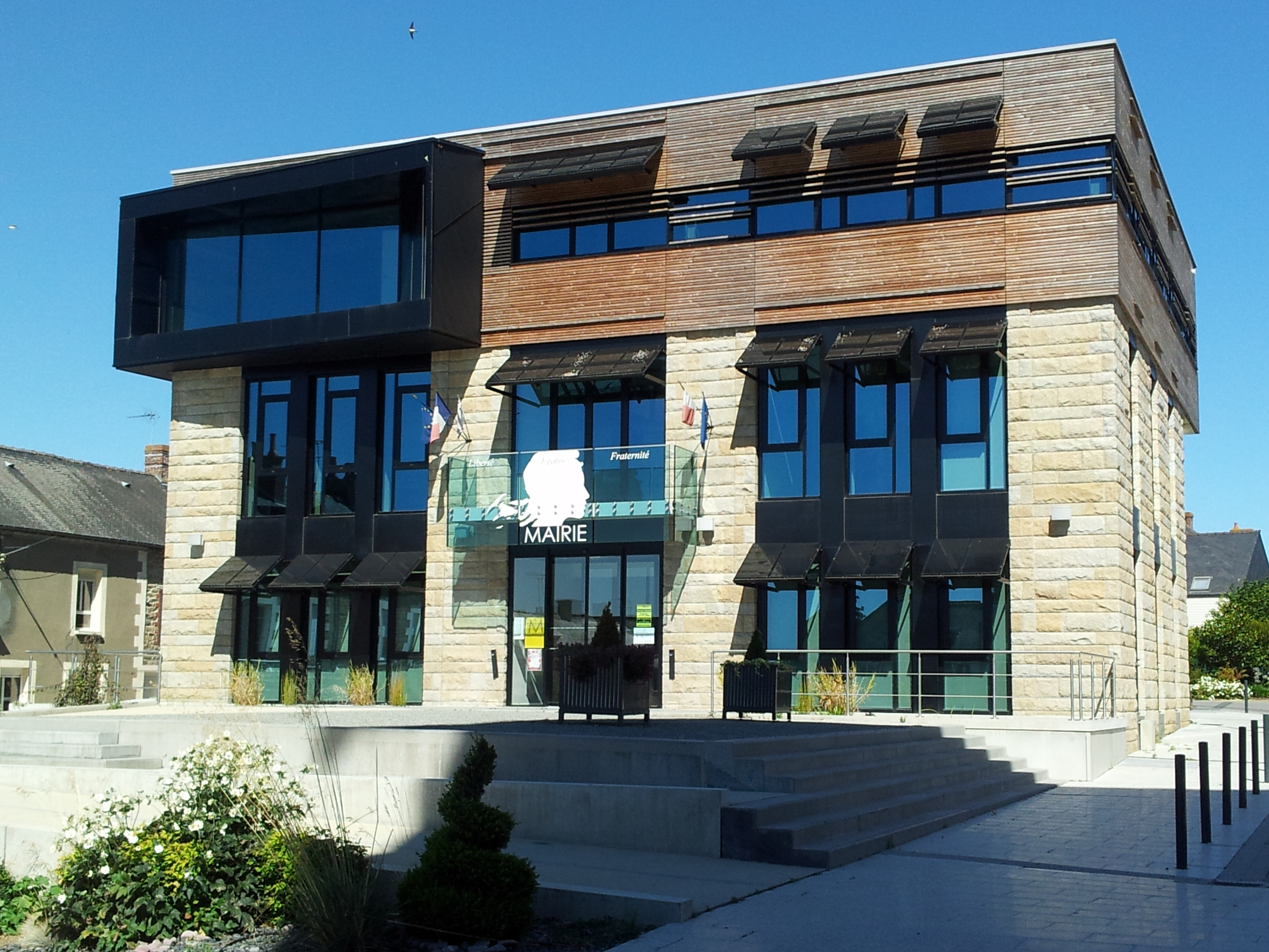 Mairie de Servon-sur-Vilaine